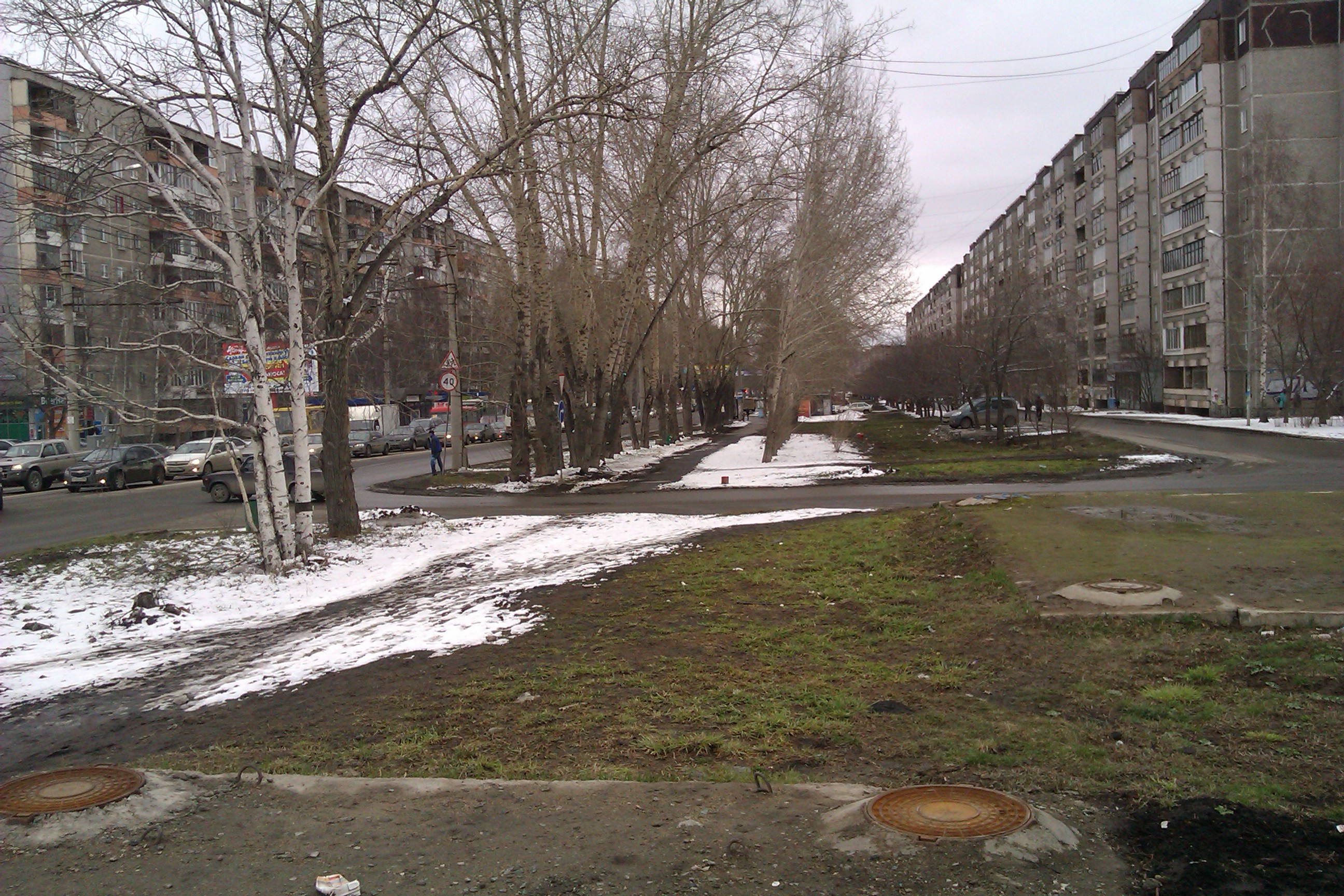 Amundsena street (Yekaterinburg)